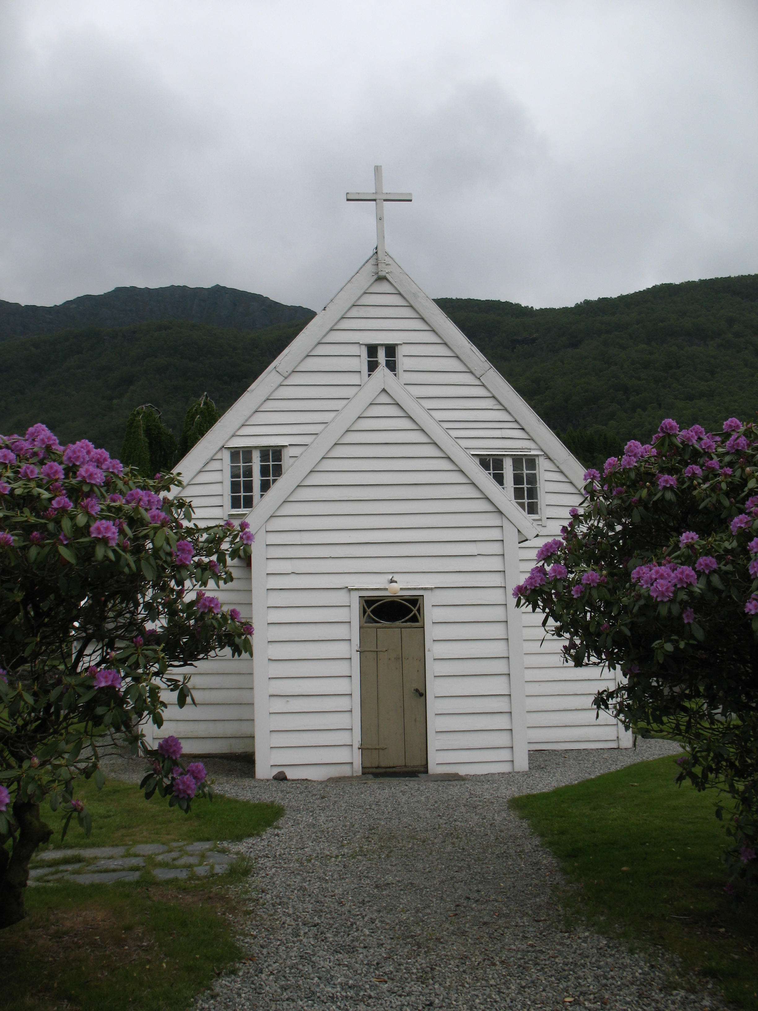 På garden Grindheim i Etne, truleg bygd mellom juli 1723 og mars 1724